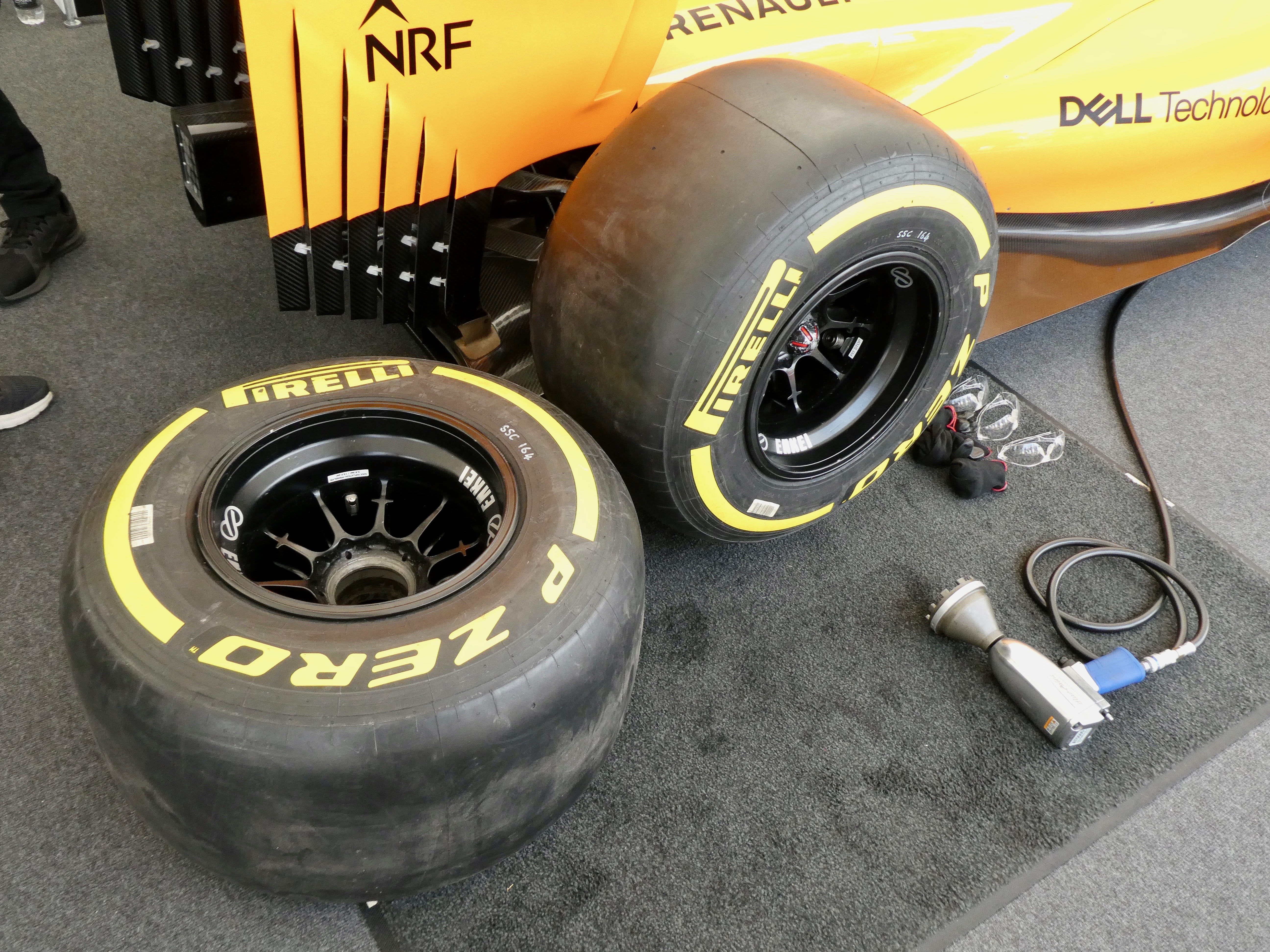 Pirelli tyres